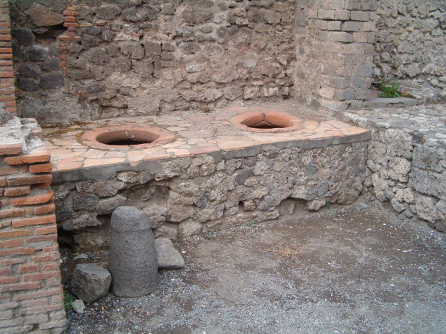 Pompei-termopolium, Pompei